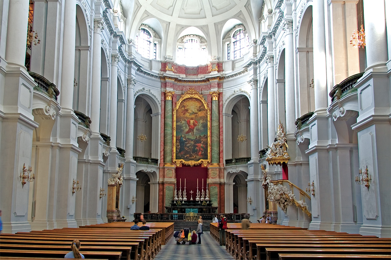 Blick durch das Kirchenschiff der Hofkirche Dresden in den Altarraum Aufgenommen im Oktober 2006 Fotograf: Timo Sack